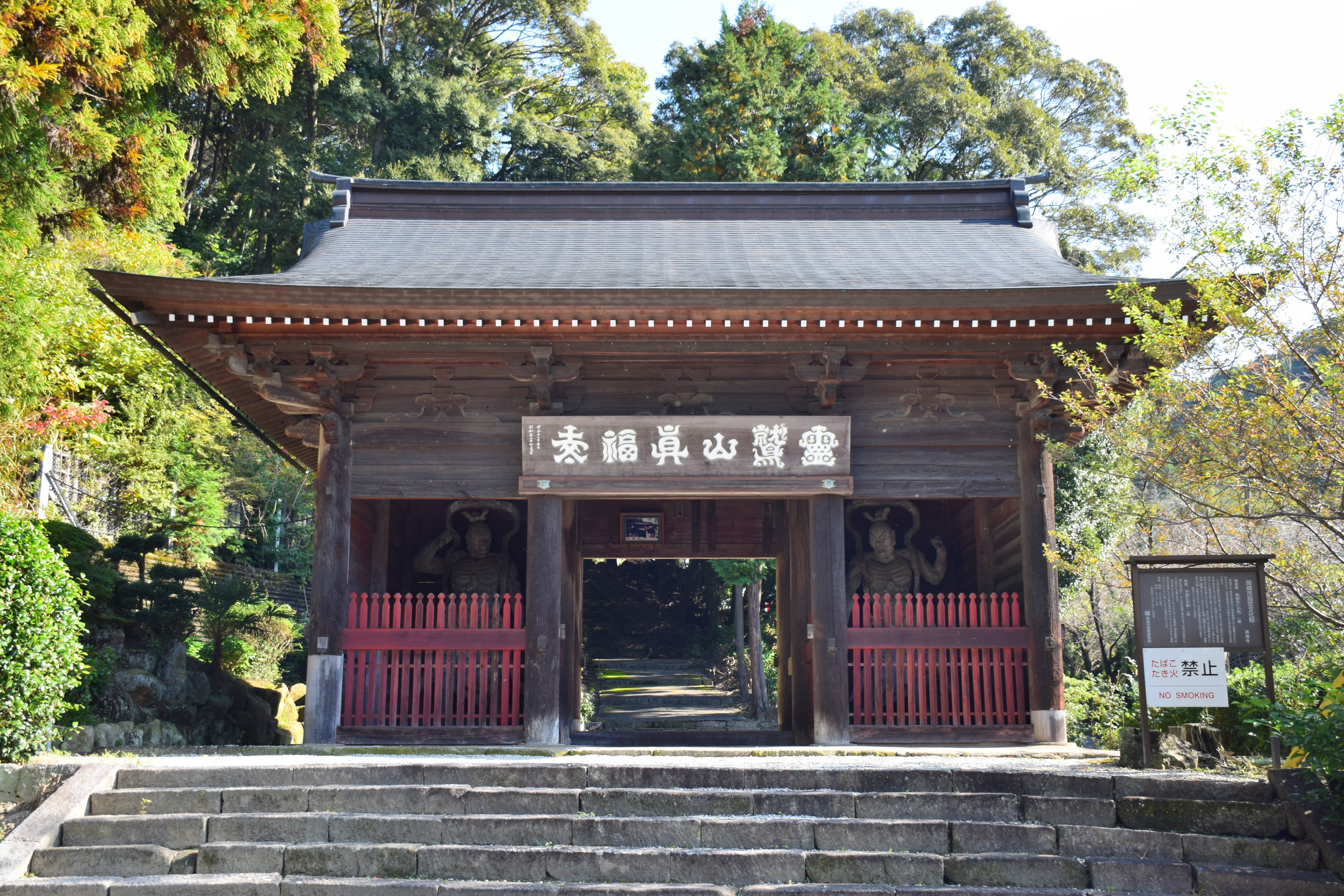 真福寺の仁王門